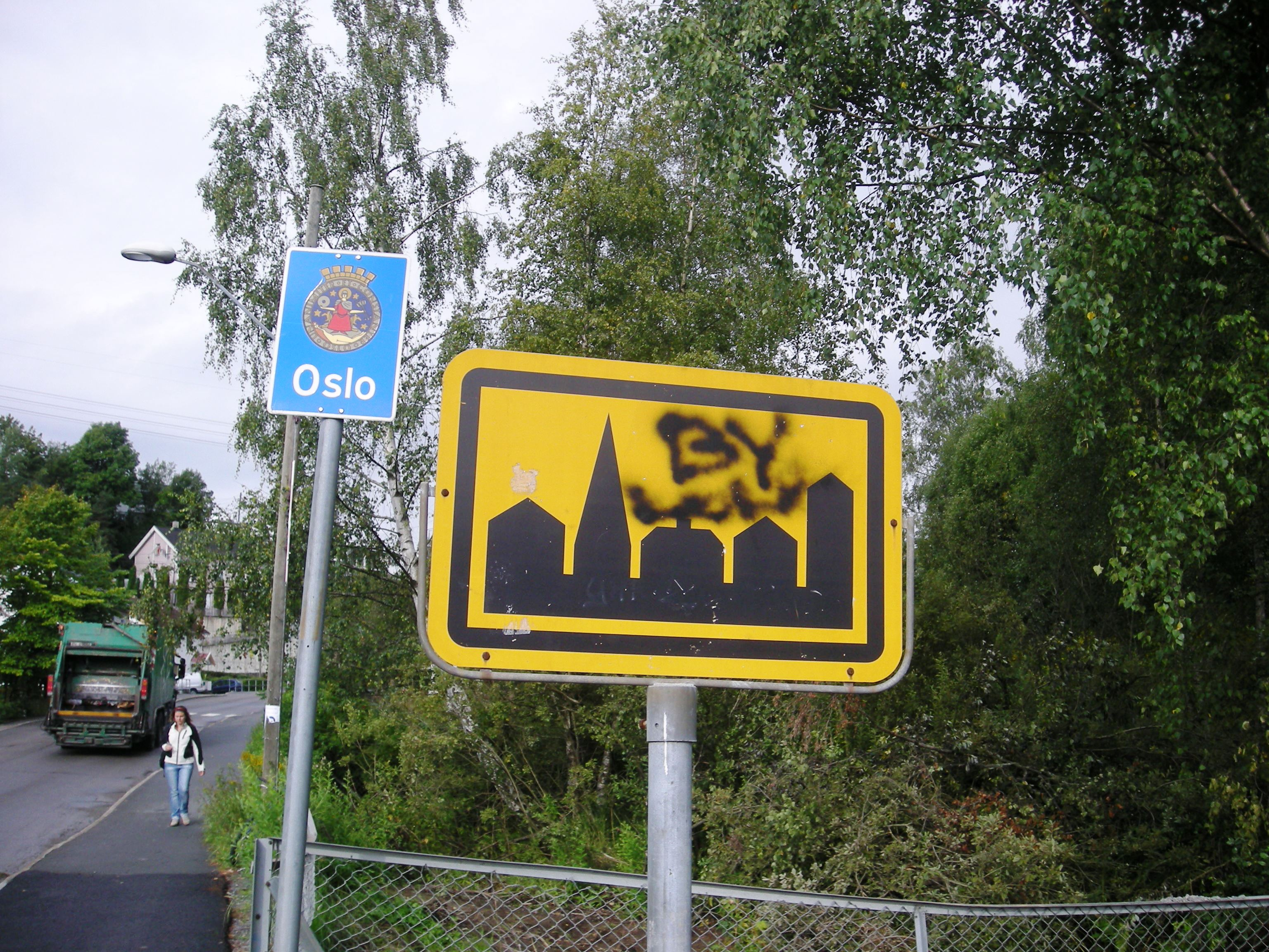 Høybråtenveien er fylkesvei 351 på Akershus-siden (i Lørenskog kommune).